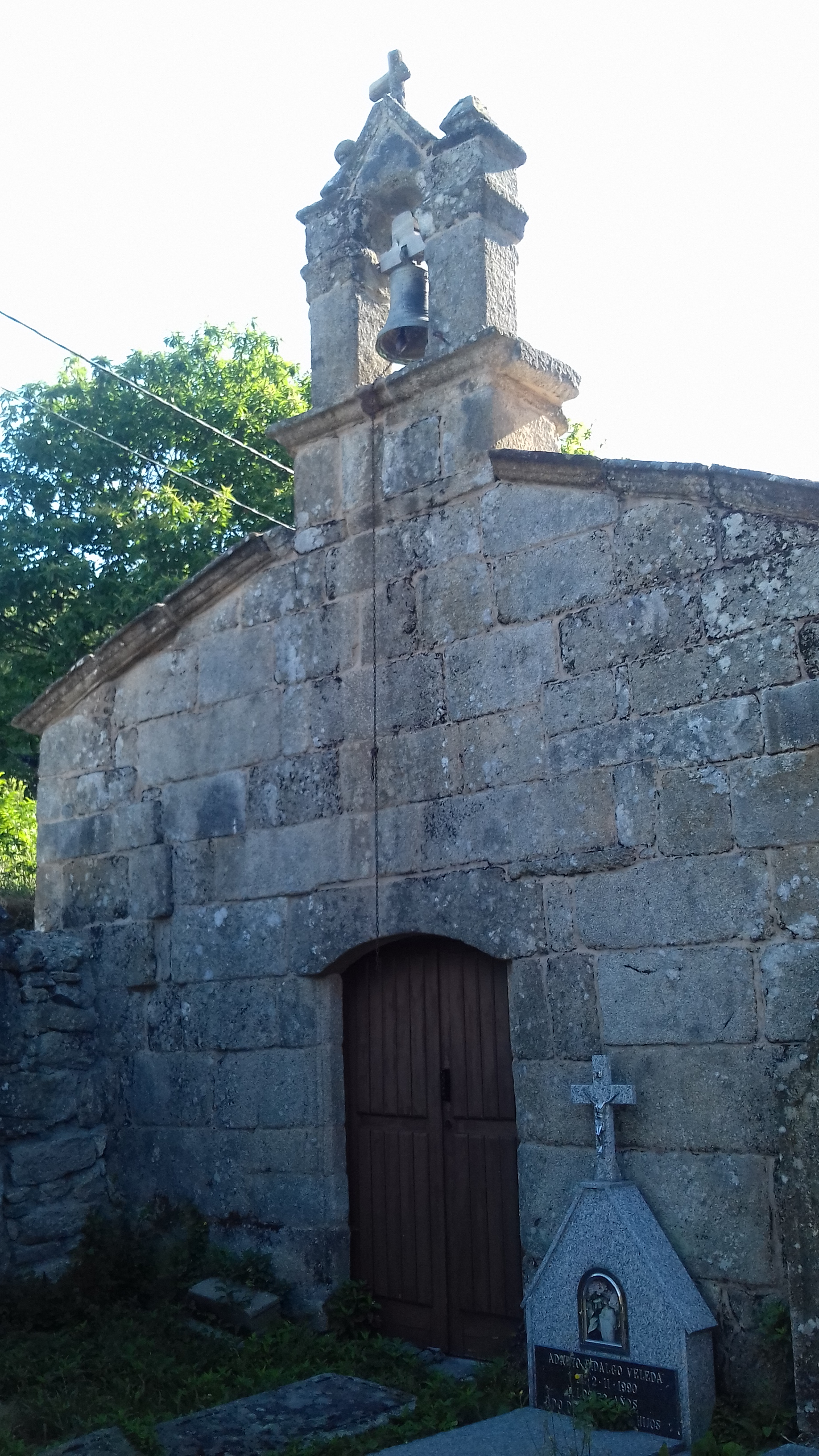 Capela de Santo André na Canda (A Vilavella, A Mezquita)